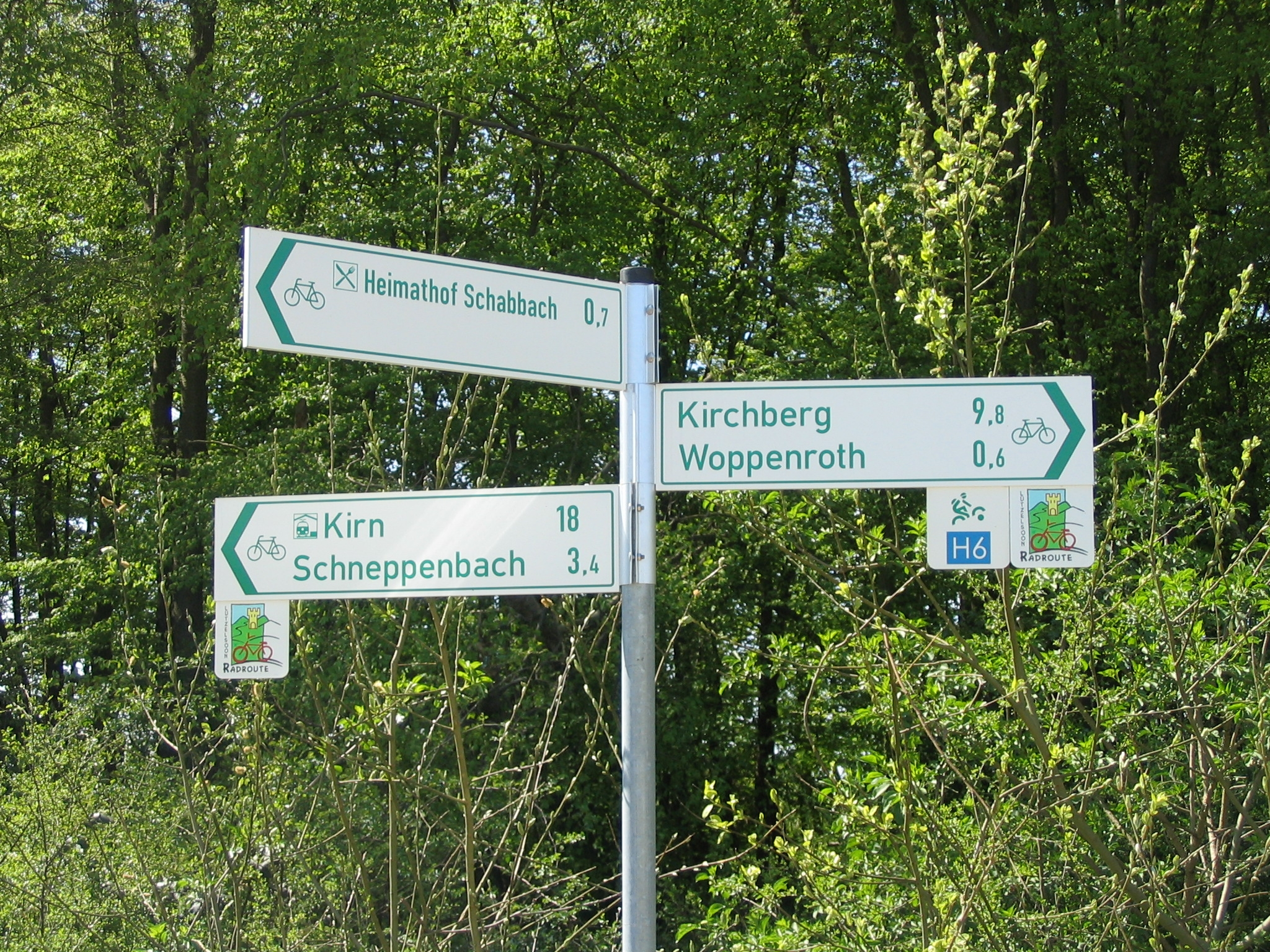 Hinweisschilder am Lützelsoonradweg